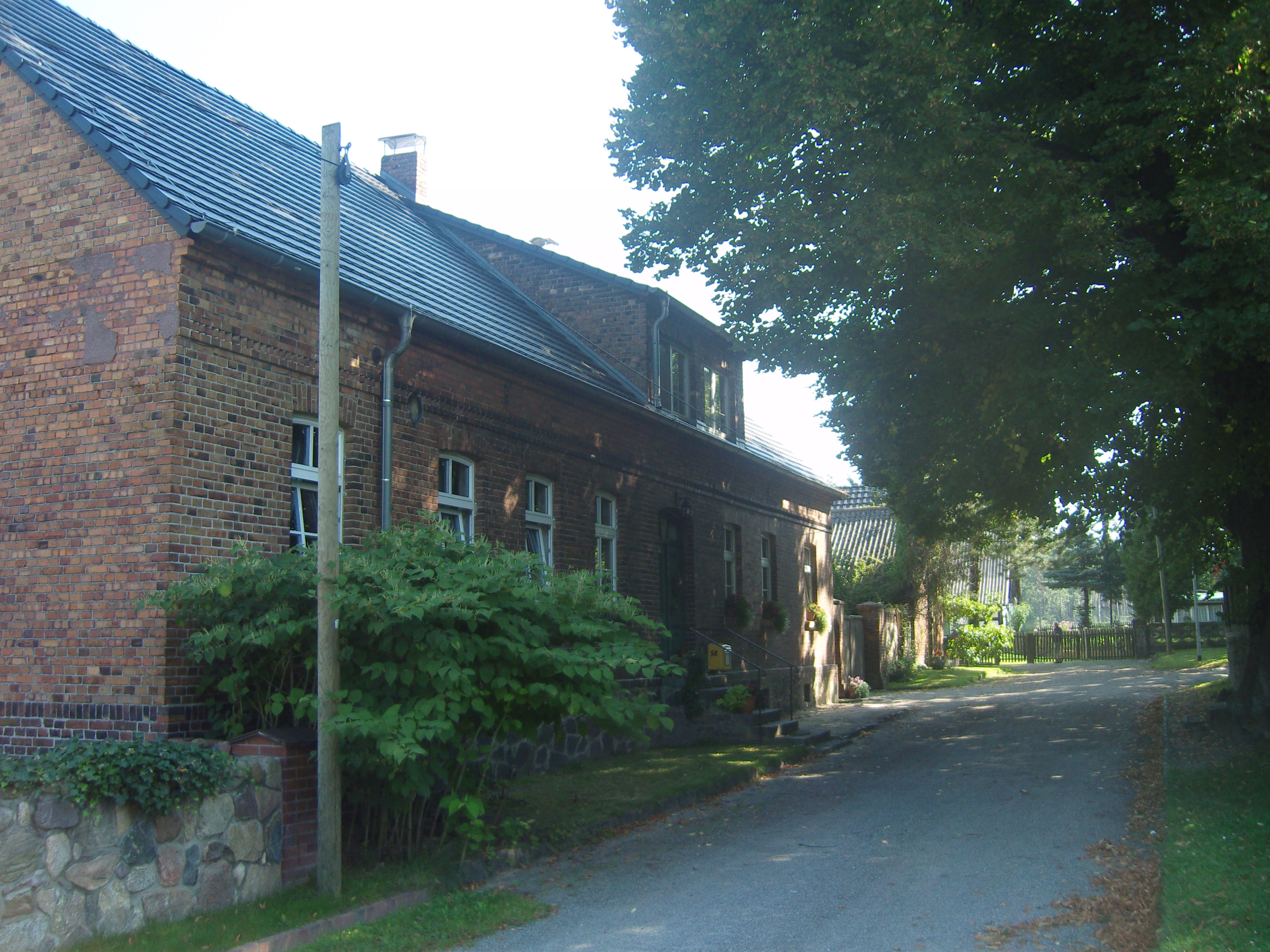 Haus in Settinchen